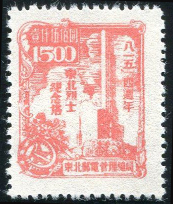 中文（香港）: 以東北烈士紀念塔為題的郵票